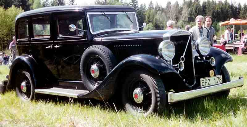 Volvo PV654 4-Door Sedan 1933